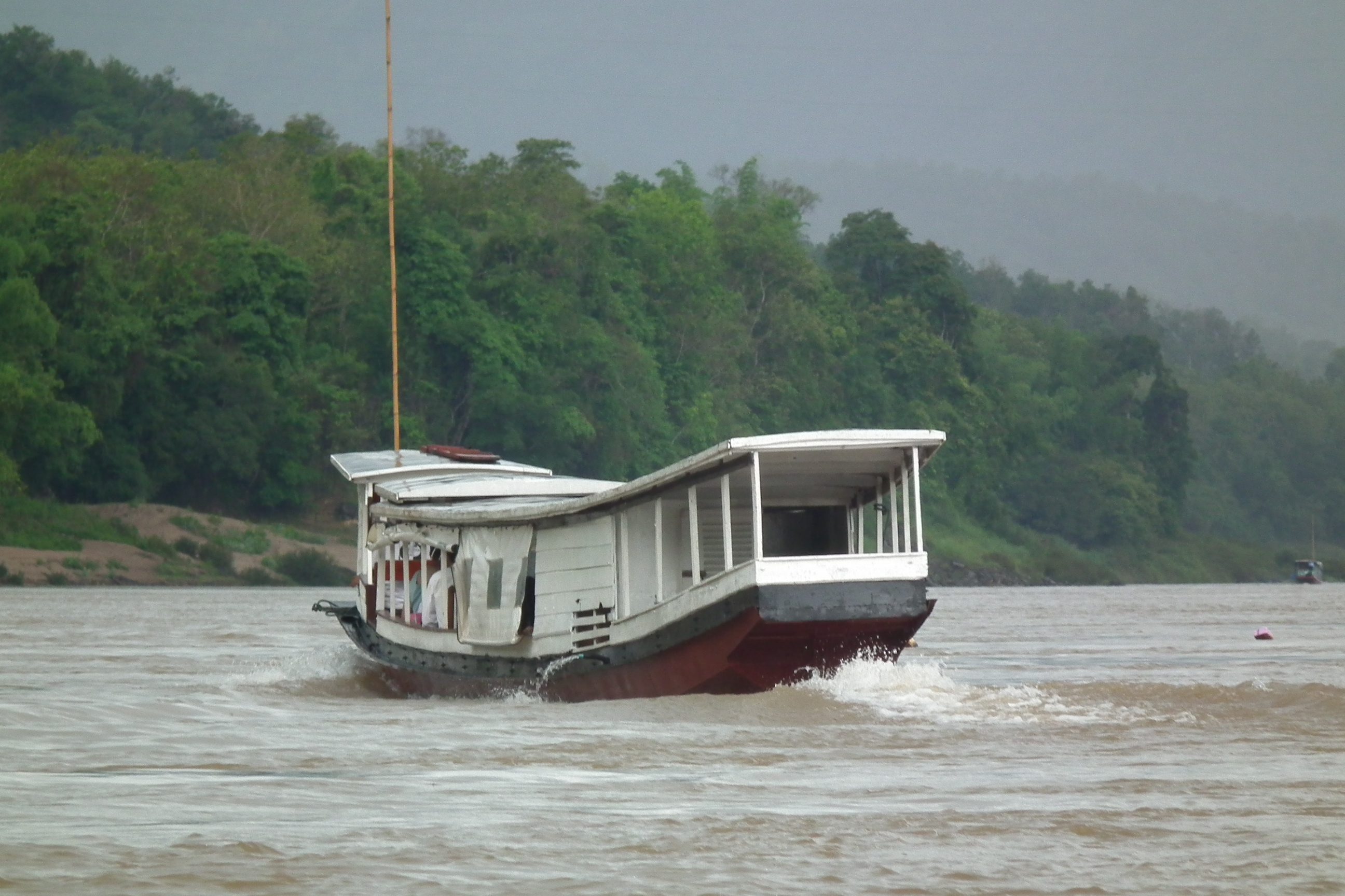 メコン川 Mekong River Luang Phabang-Laos แม่น้ำโขง